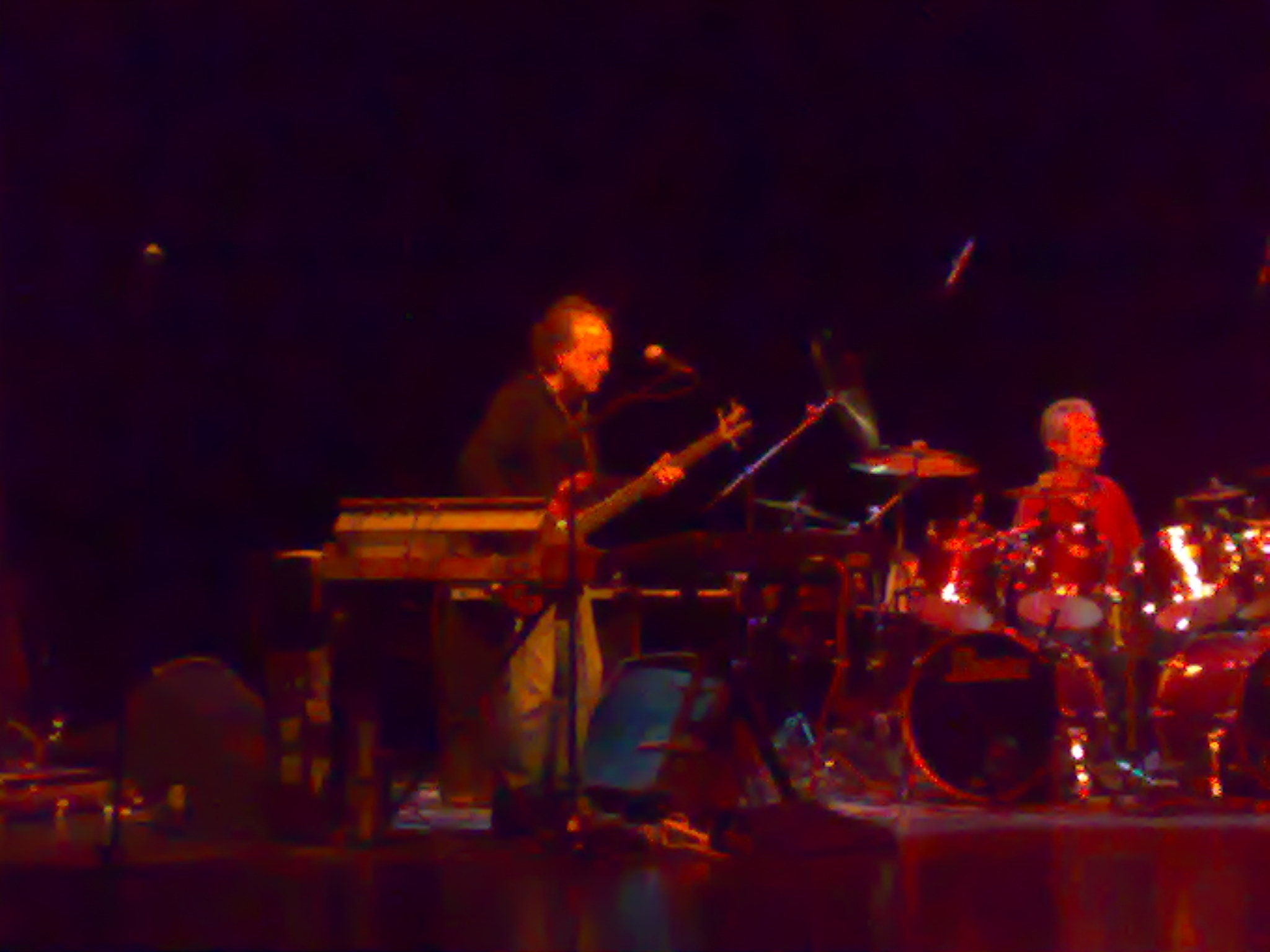 Koncert grupy SBB.